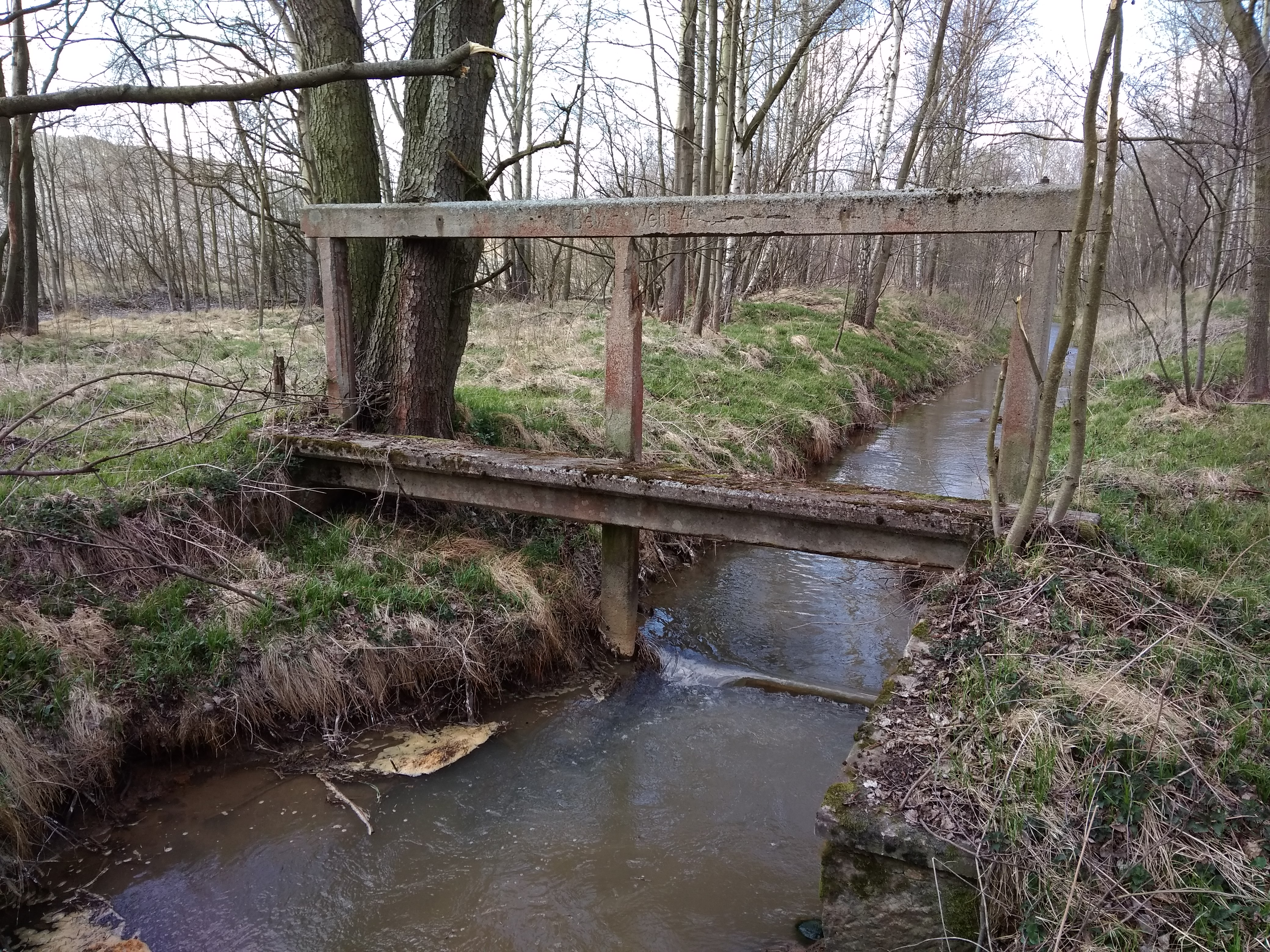 pozůstatek betonového stavidla s lávkou na Vlčím potoce pod Jimlíkovem, foto duben 2020